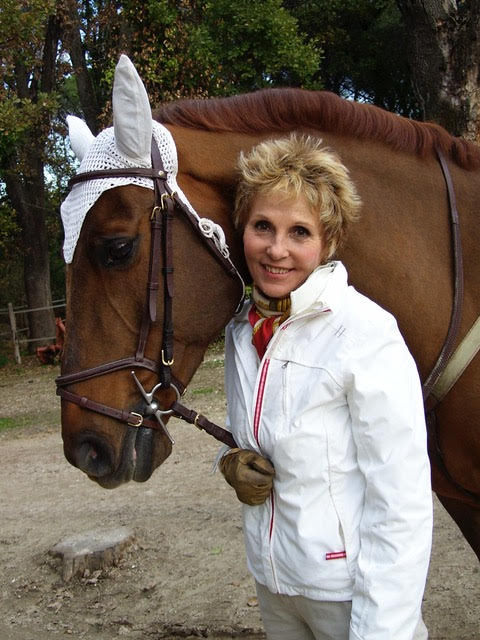 Patrizia Carrano e Vouga